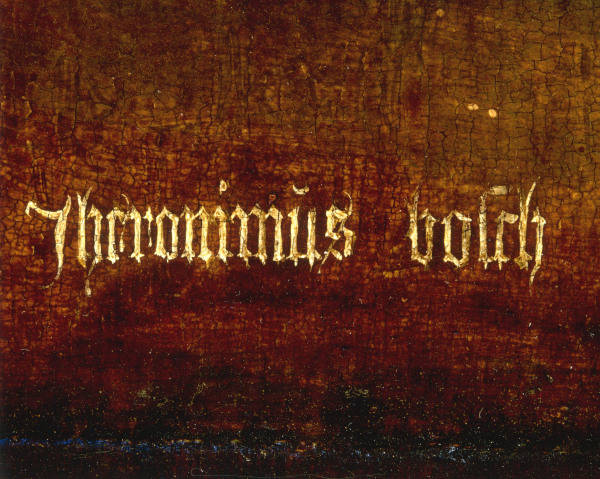 central panel, detail.